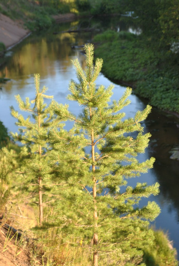 Бузулукский бор: Территория лесного массива находится на границе Оренбургской и Самарской областей в пределах четырех смежных административных районов: Богатовского, Борского, Кинель-Черкасского (Самарская область) и Бузулукского (Оренбургская область). Территория собственно бора находится в пределах географических координат 53°19?-52°53? с.ш. и 51°05?-52°ЗГ в.д. Основной лесной монолит имеет форму треугольника, протянувшегося по широте на 53 км, а по долготе – на 34 км,Бузулукский район, Оренбургская область This image is related to the protected area of Russia number 5600018